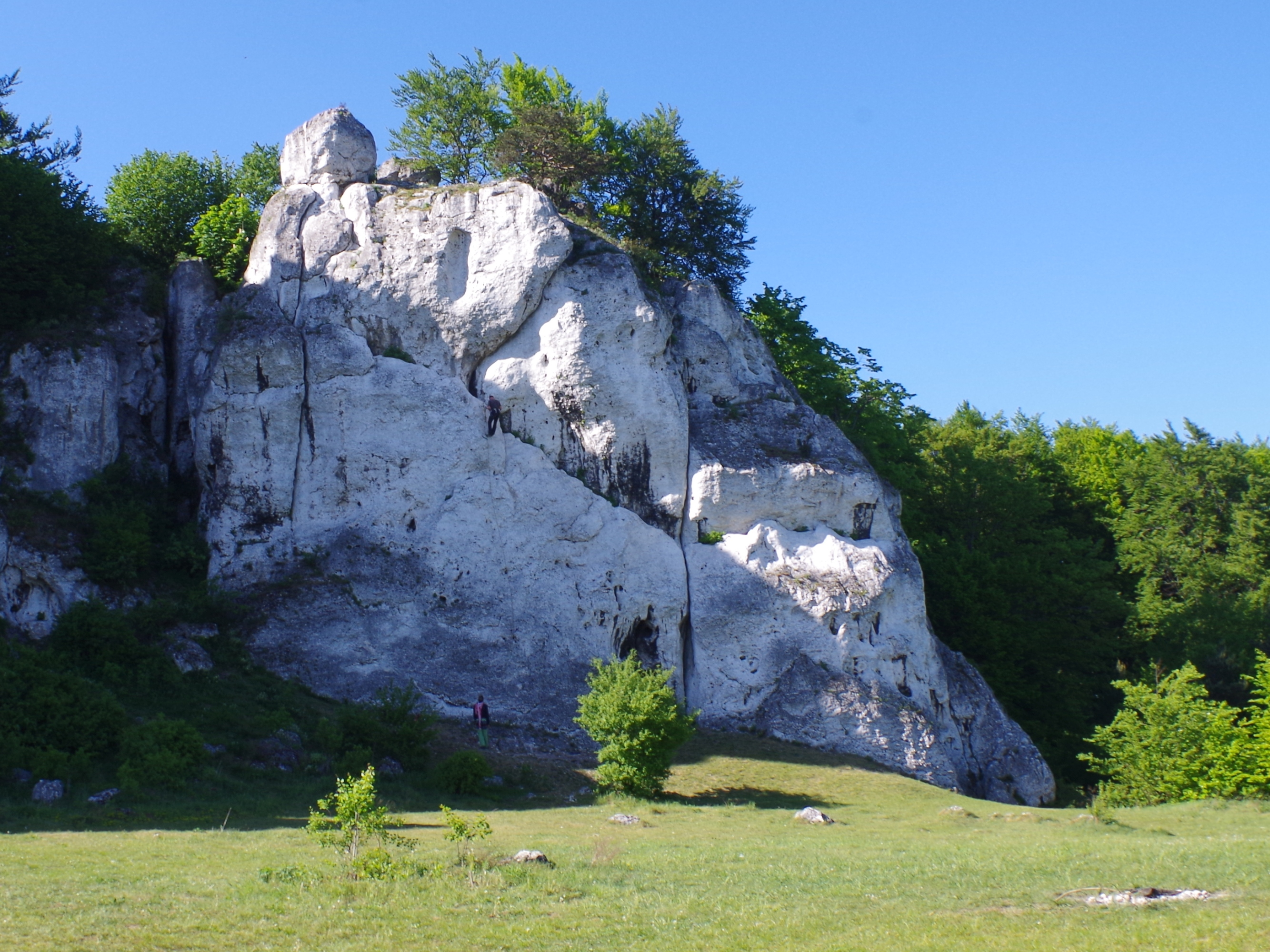 Skały Rzędkowickie. Słoneczna